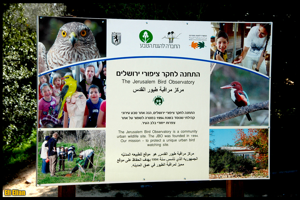 המכון לחקר הציפורים בירושלים